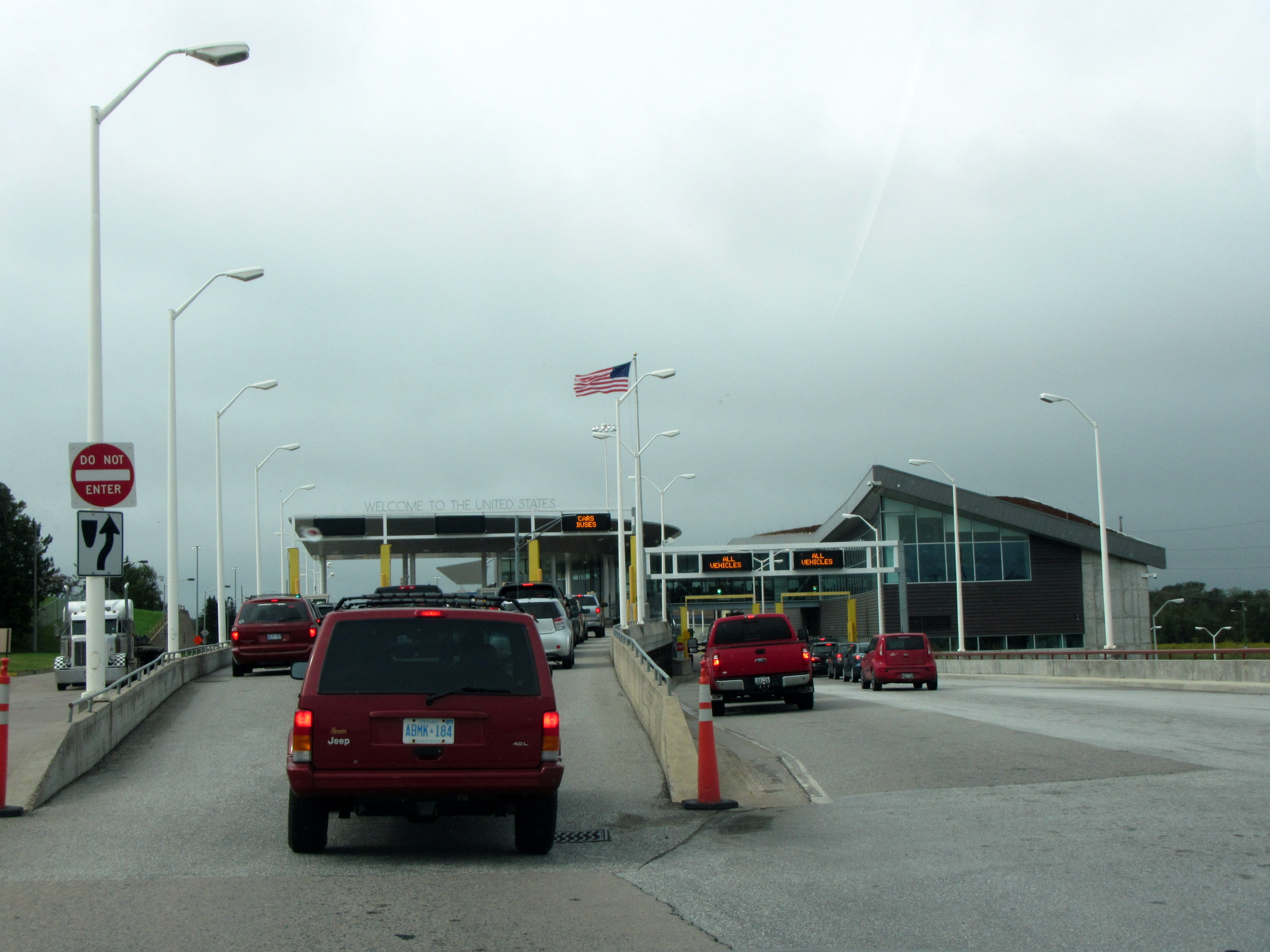 US Border Control in Sault Ste. Marie - Inspección Fronteriza de los Estados Unidos